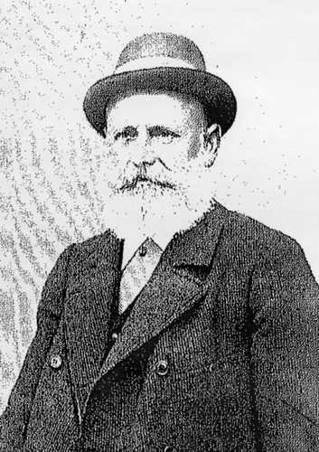 Burgschauspieler Hermann Schöne (1836-1902)